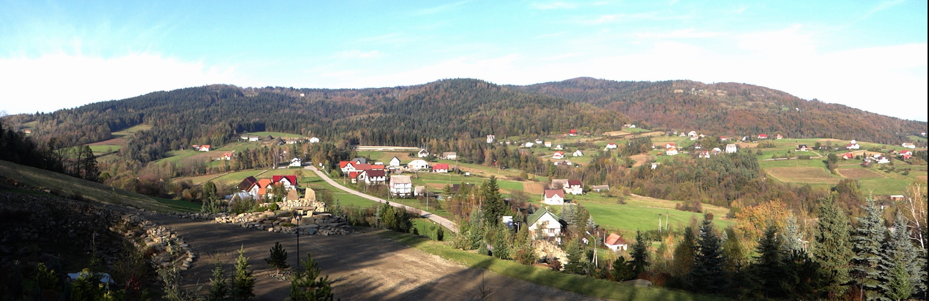 Panorama widokowa z Pasierbca na Pasierbiecką Górę i Kamionną